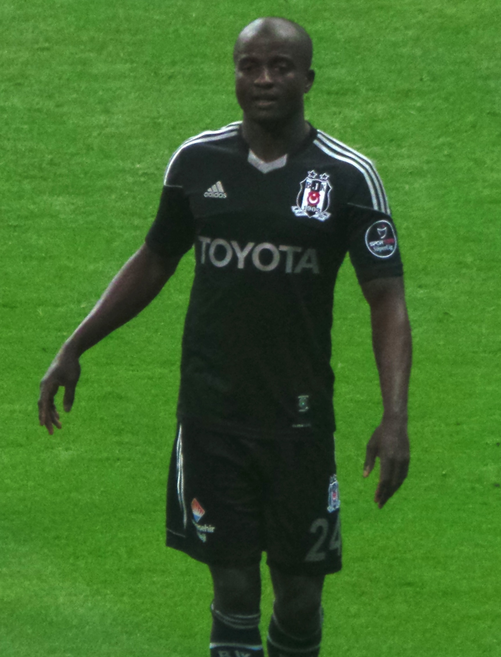 Dany Beşiktaş formasıyla eski takımı Galatasaray'a karşı.